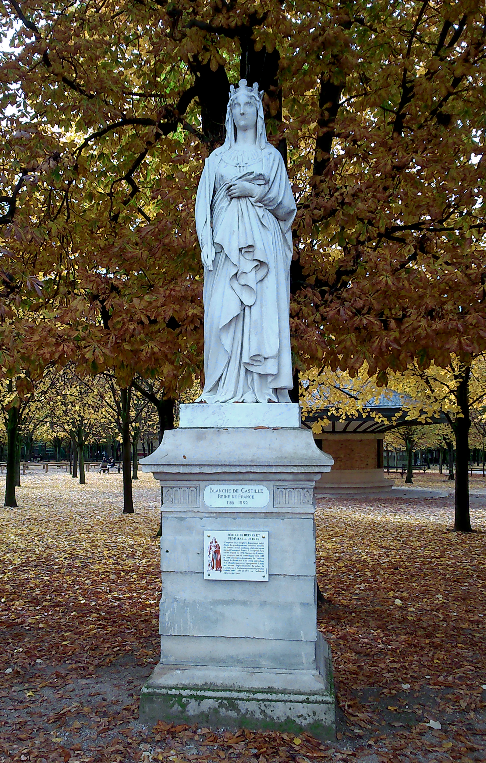 Jardin du Luxembourg, Paris, Statues des Reines de France, Blanche de Castille. Sculptée par Auguste Dumont en 1848.